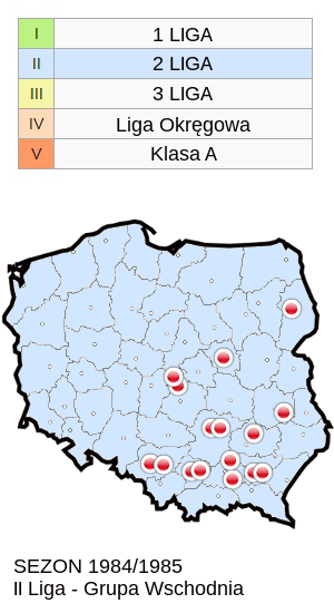 Jagiellonia w sezonie 1984/85 mapa